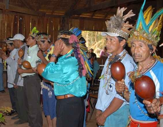 Guaranis. Líderes indígenas do Brasil e de outros três países participam do lançamento da campanha "Povo Guarani, Grande Povo!" O evento acontece na aldeia Tey Kue, em Caarapó (MS). Na região sul do estado, concentra-se a maior parte da população da etnia no Brasil.